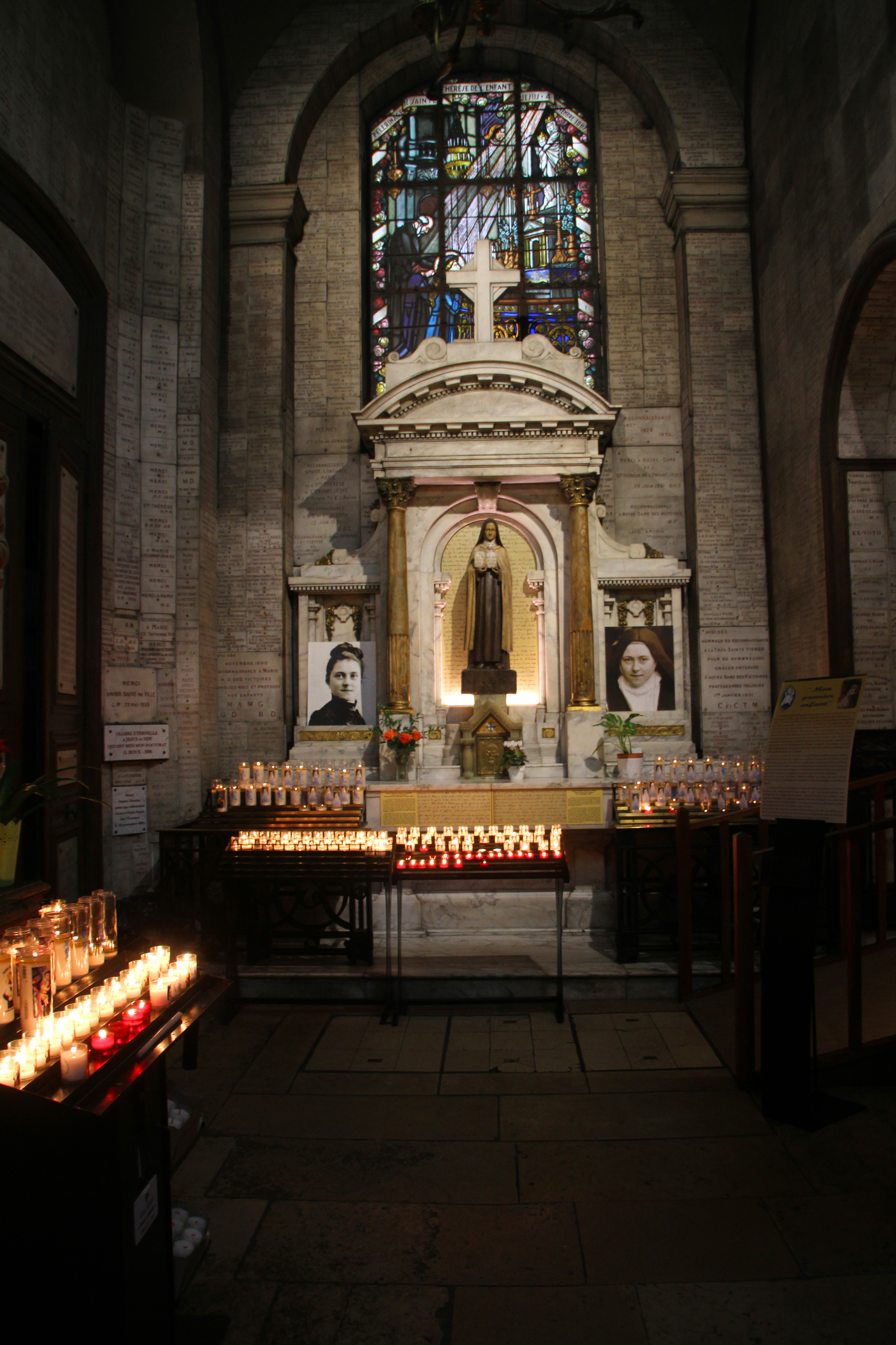 Notre-Dame-des-Victoires in Paris